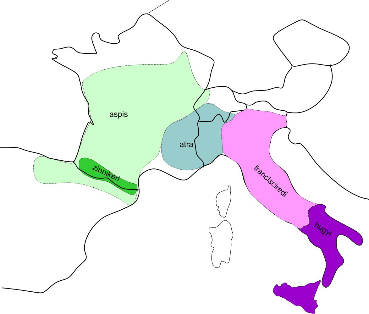 carte des sous-espèces de Vipera aspis, d'après M. Zuffi, A critique of the systematic position... Amphibia-Reptilia, 23, (2002)